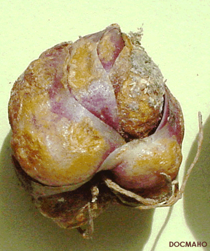 Lilium nepalense bulb